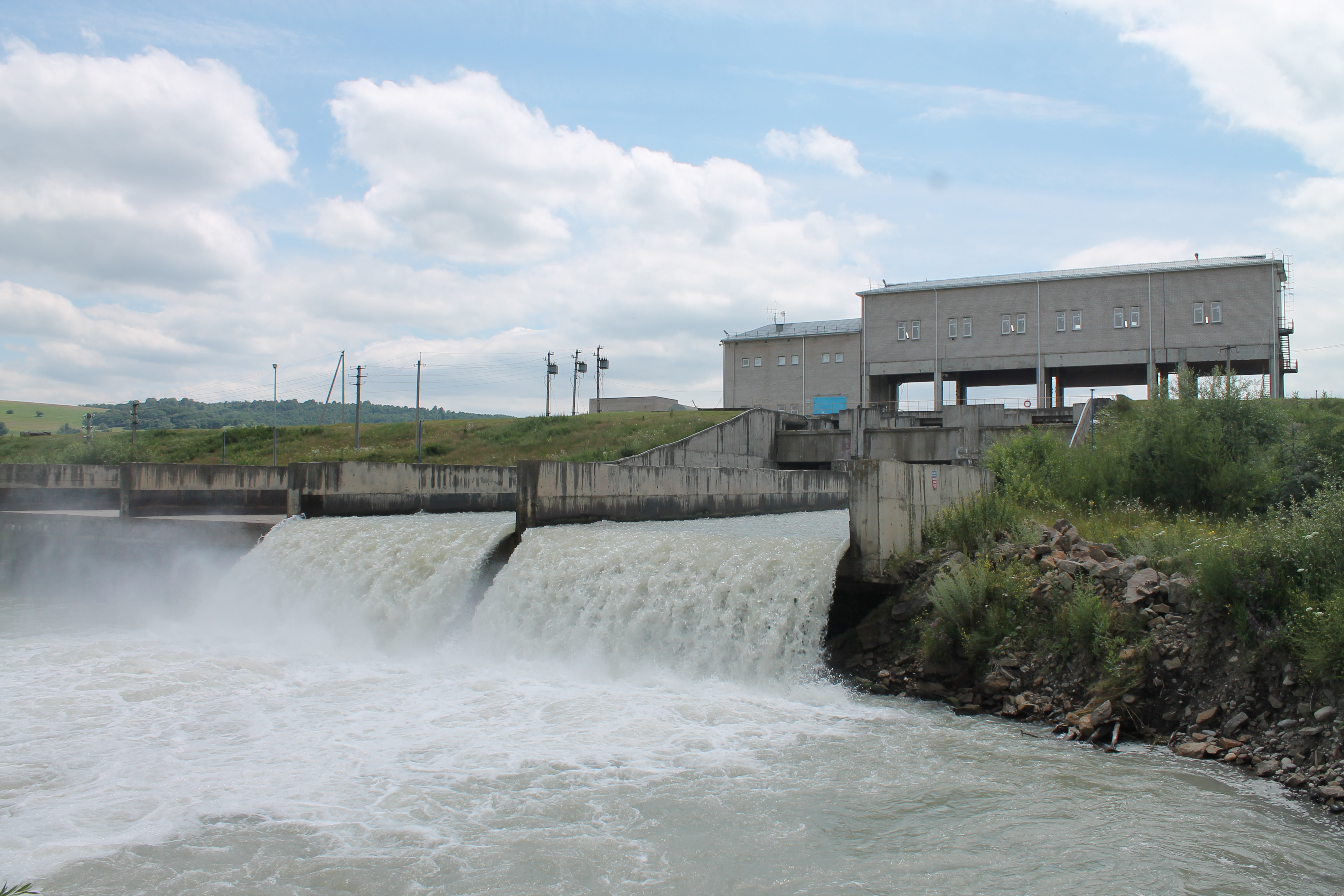 Аксаутский гидроузел Зеленчукской ГЭС-ГАЭС